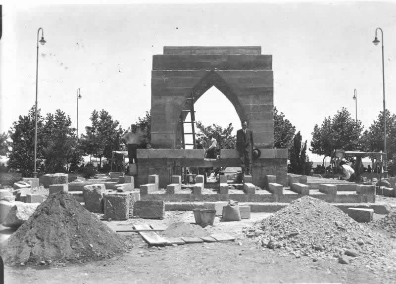 Onur Anıtı kaidesinin inşaat çalışmaları.